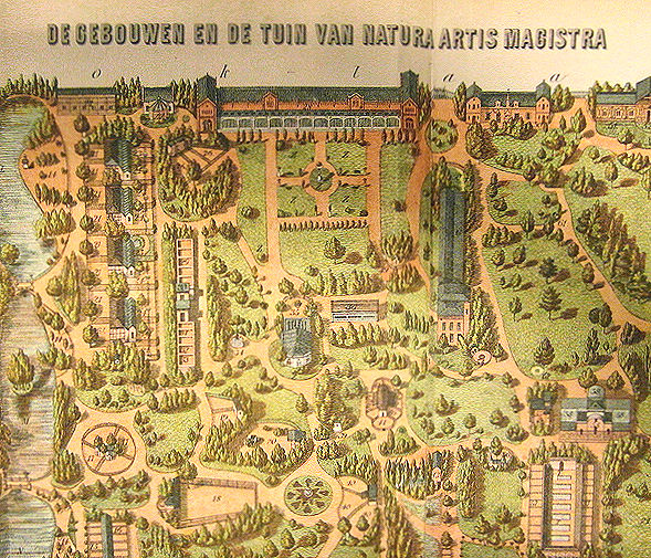 Detail van een plattegrond van Artis (1872) van P.H. Witkamp, gepubliceerd in De Dierentuin van het Koninklijk Zoölogisch Genootschap Natura Artis Magistra te Amsterdam. Uitgegeven bij Gebroeders van Es in Amsterdam.